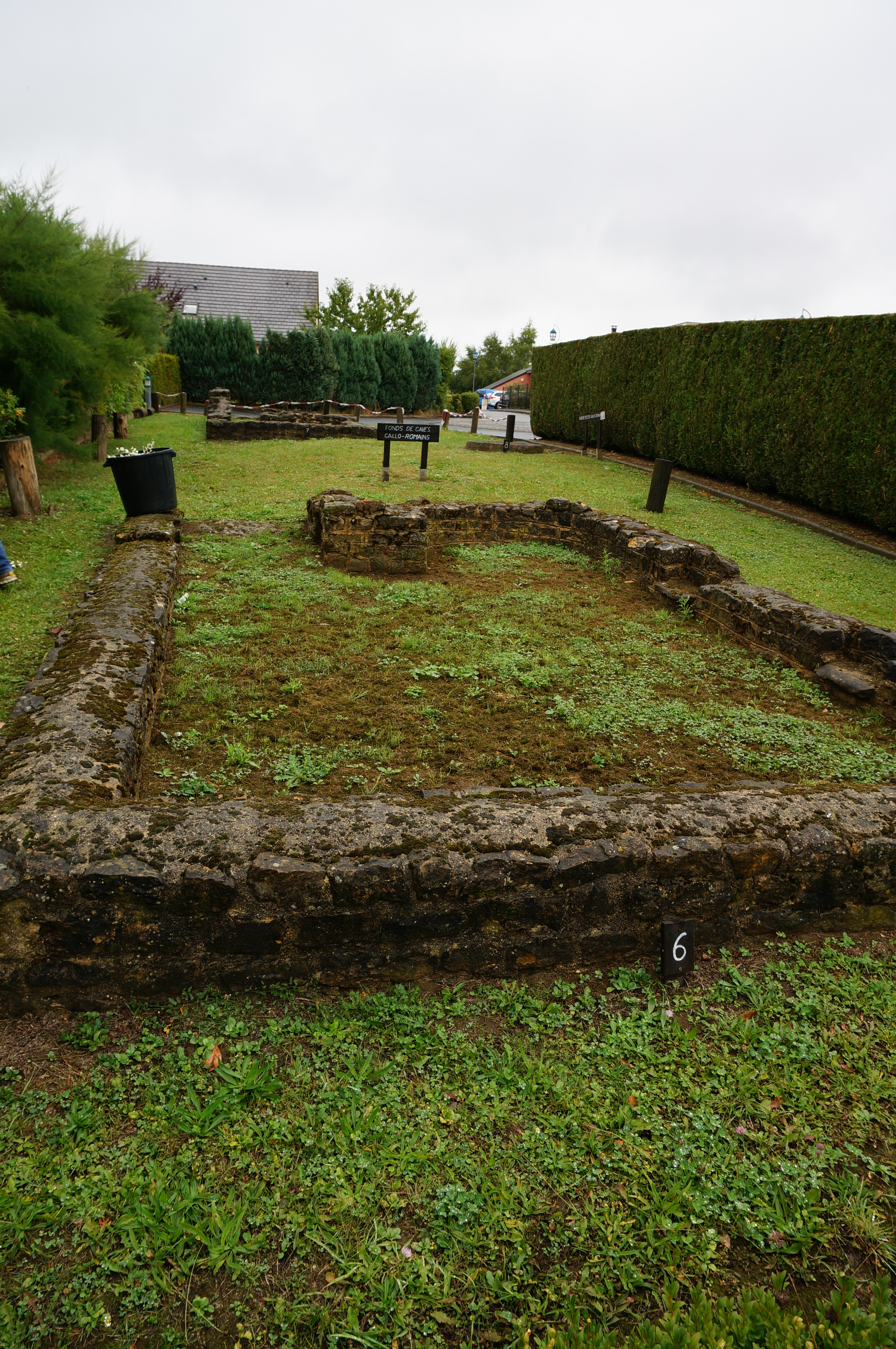 2 maisons gauloises du village .